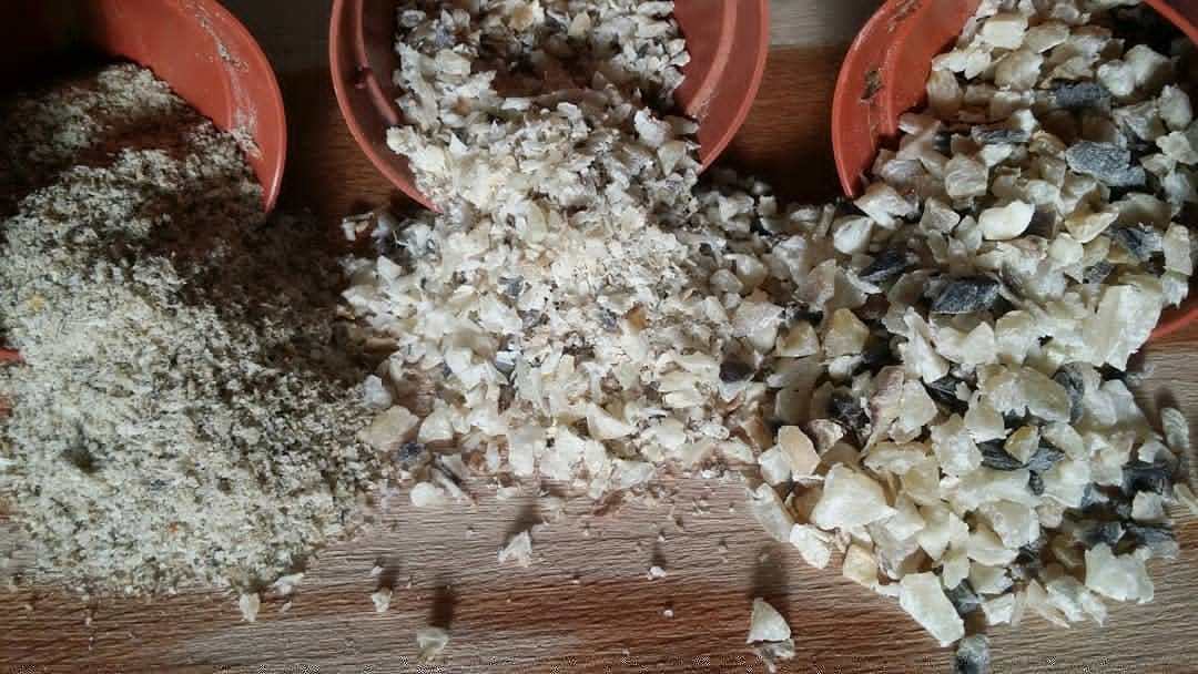 различные фракции удобрения